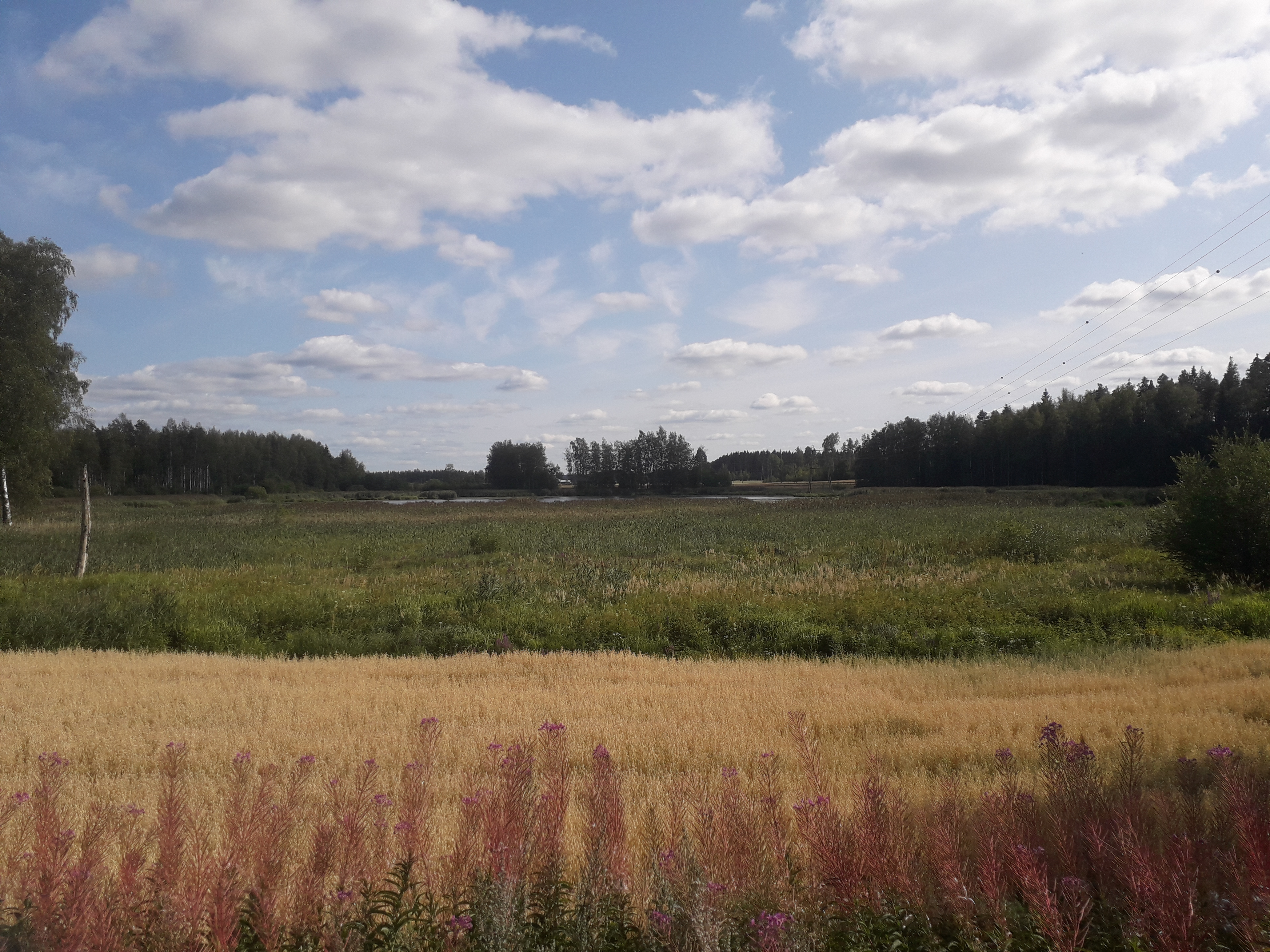 Kasvillisuutta Riihimäellä sijaitsevan Arolammen pohjoisrannalla.